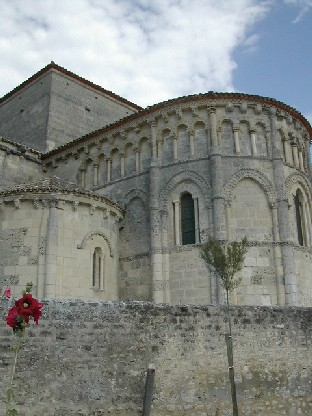 Chevet de l'Eglise de Talmont sur Gironde Auteur : Marc Liger Copyright : image sous GFDL Marc Liger